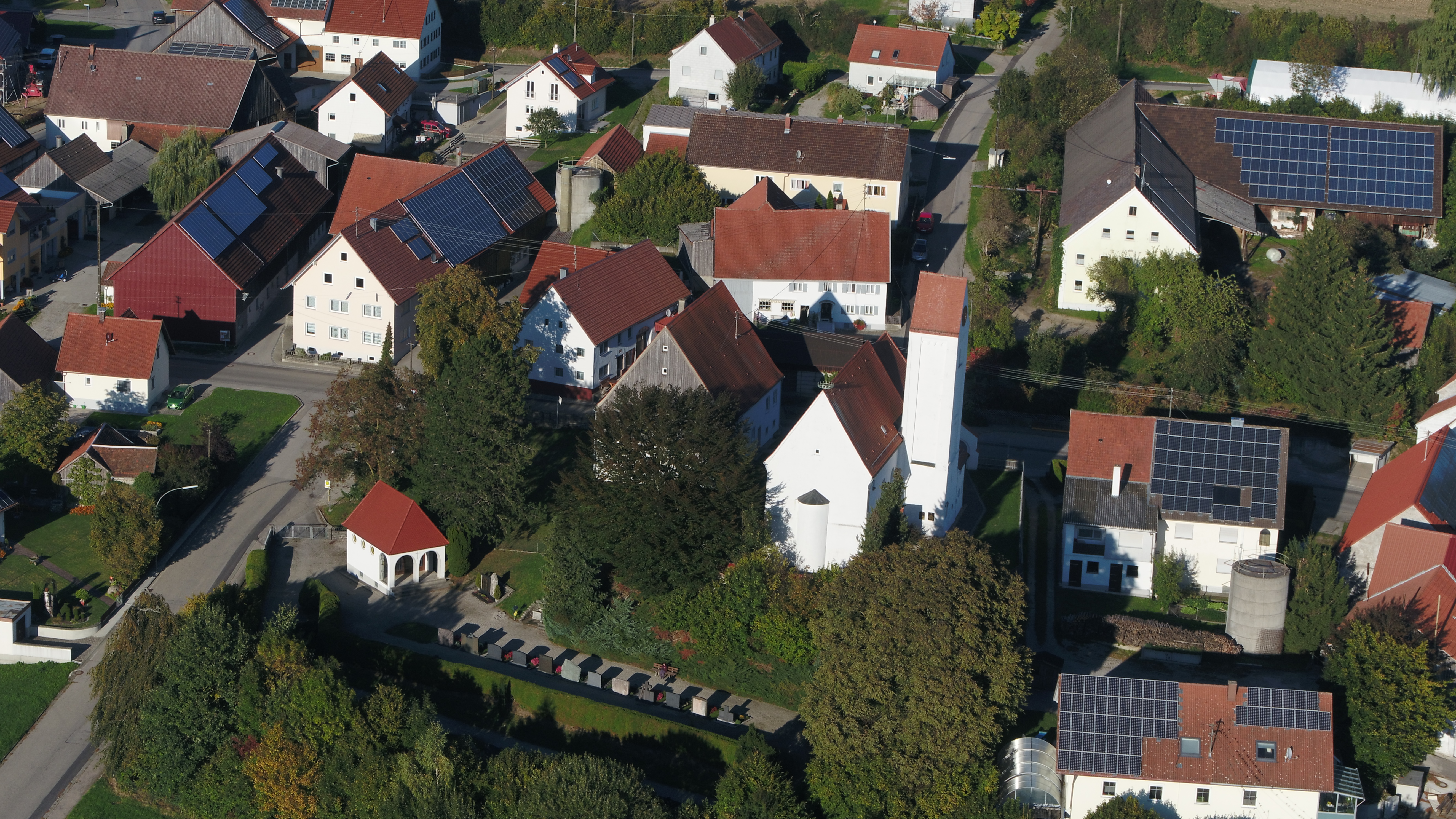 Mörgen, Gemeinde Eppishausen mit Kirche St. Georg und Friedhof